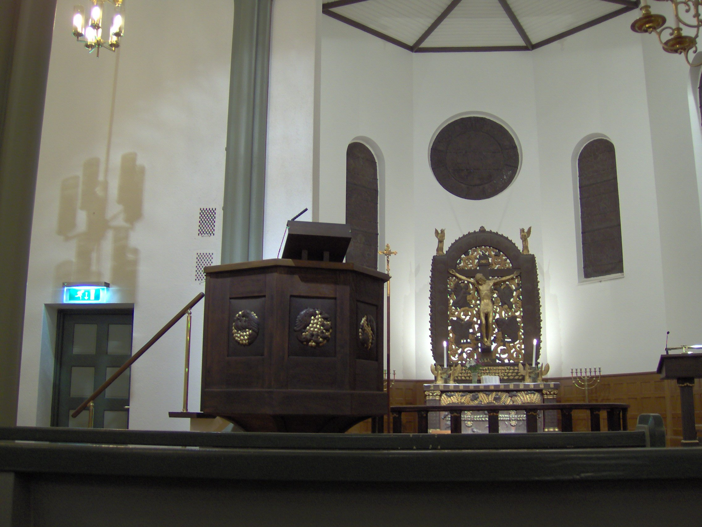 Bryn church in Bærum, Norway